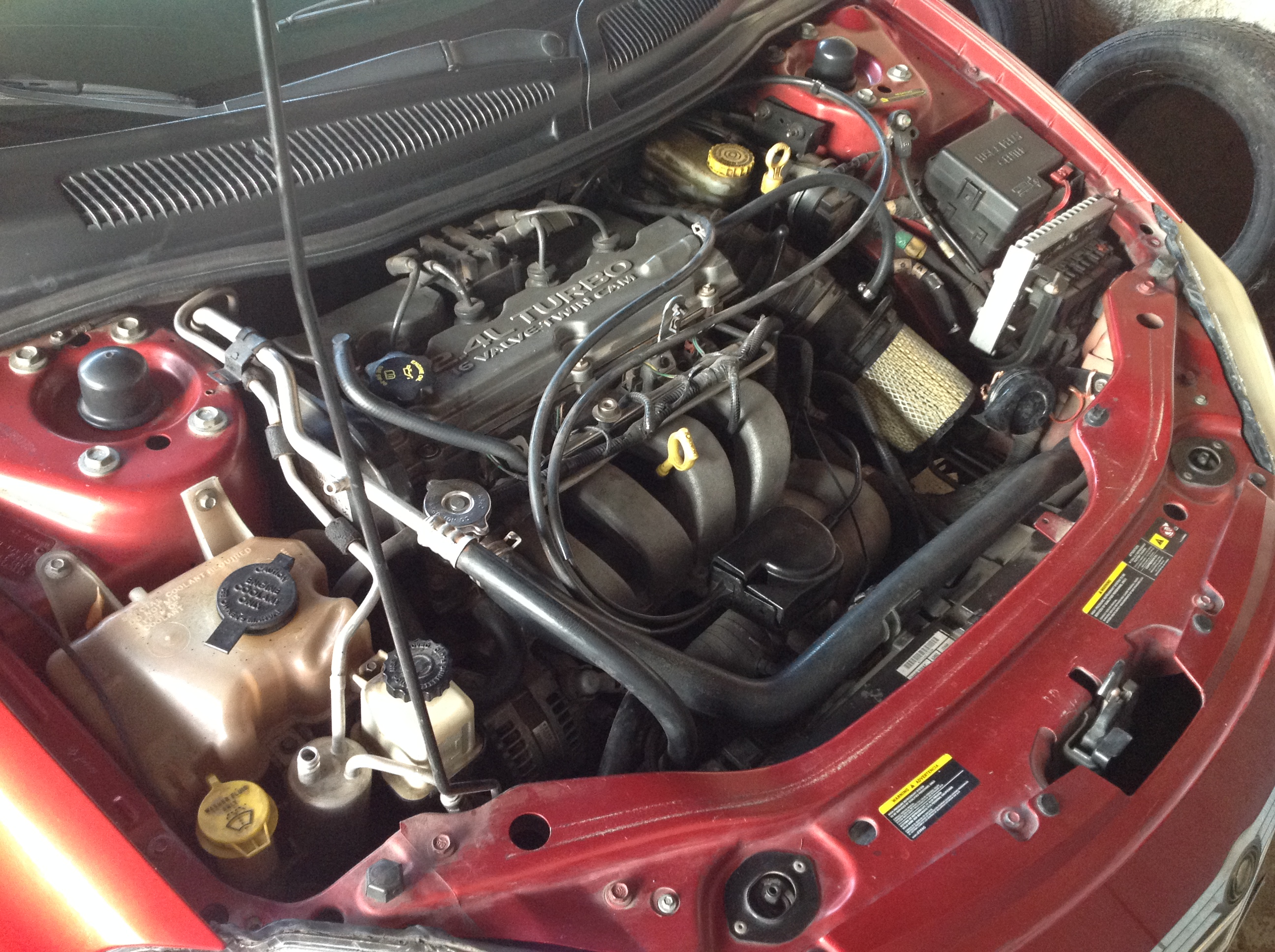 EDV 2.4L Turbo engine used in a Mexican Stratus R/T & Cirrus (2001-2006)